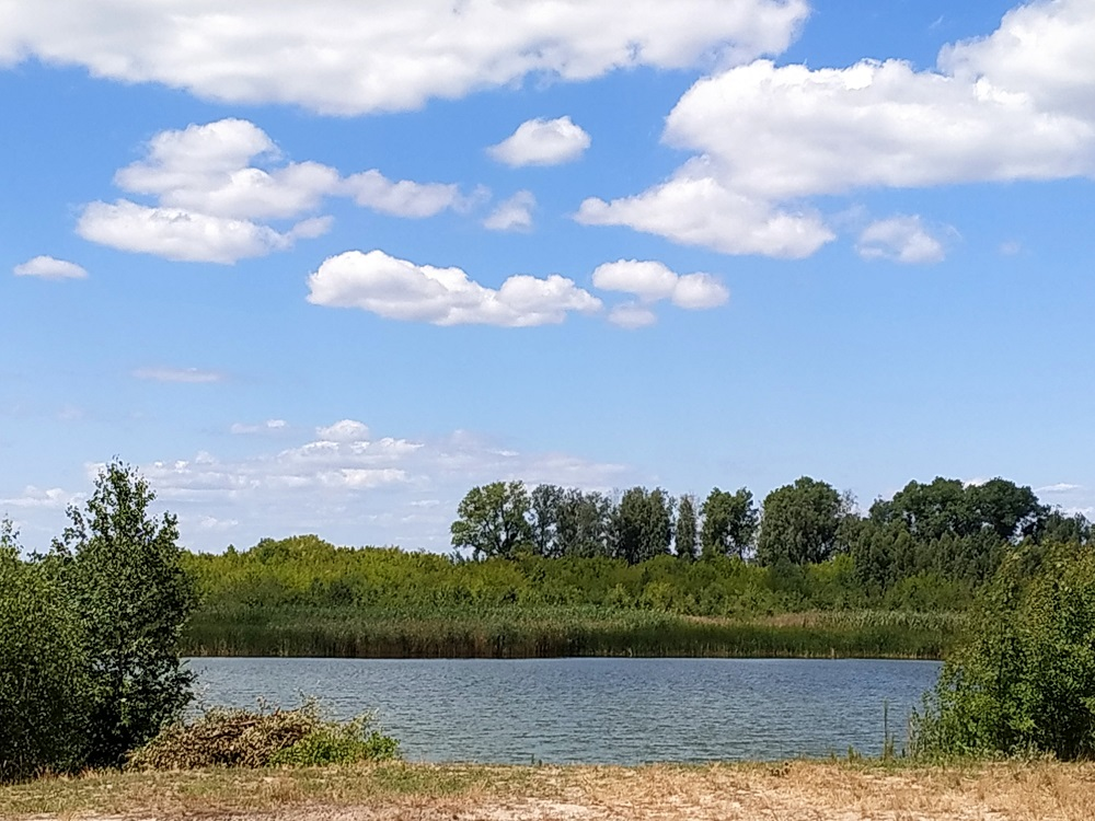 Озеро Варги (Варяги) біля села Савин Козелецького району